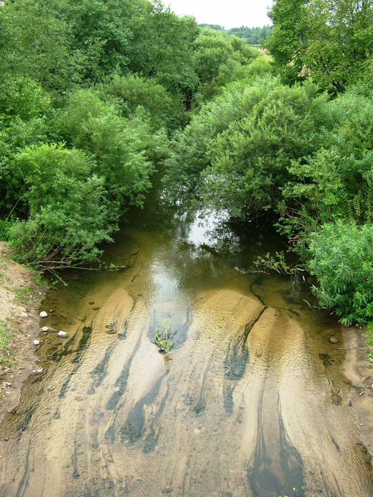 Lokysta ties Šilale